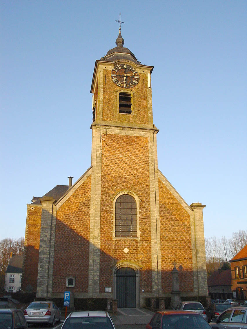 Mollem Church